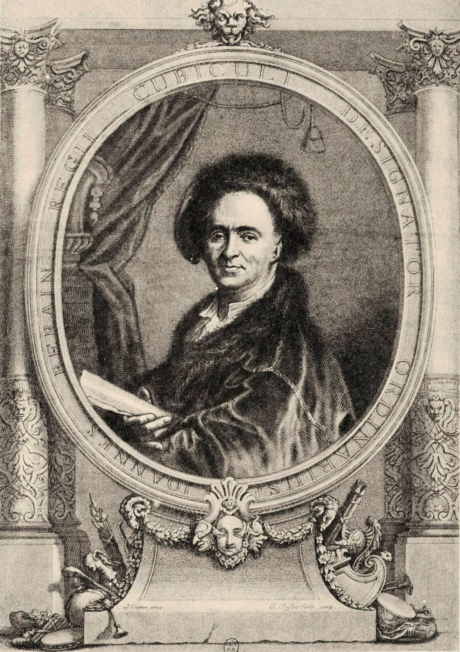 Portrait of Jean Bérain père (1640-1711)